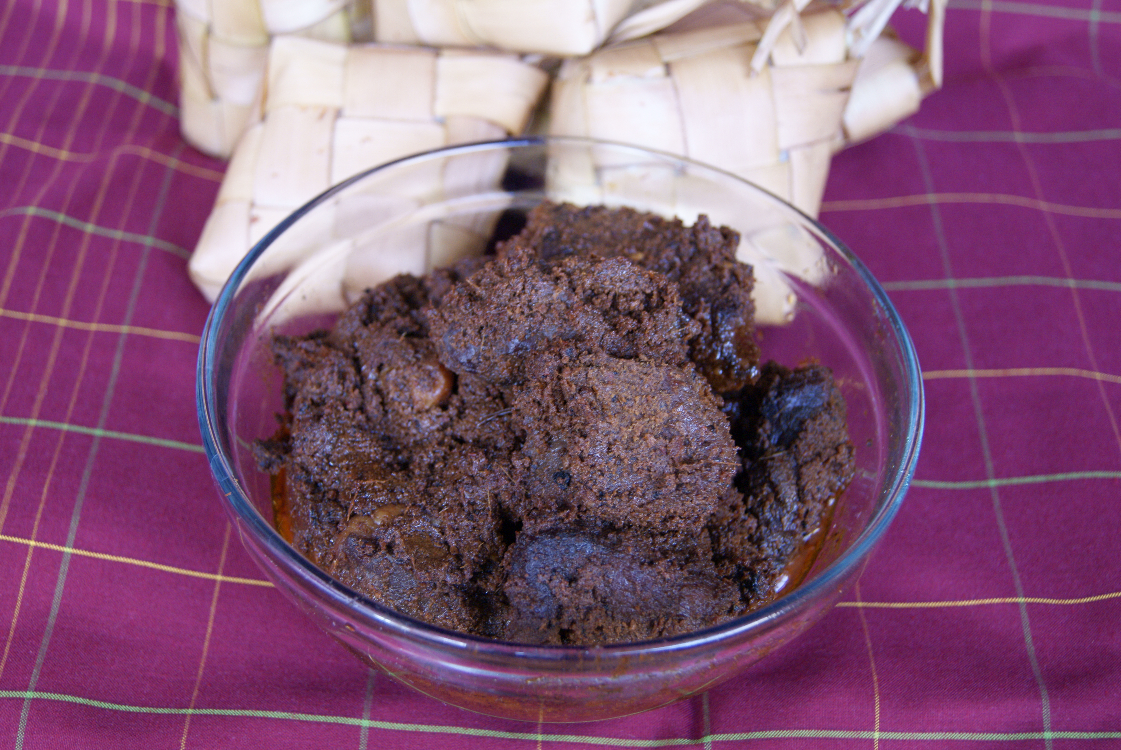 Rendang daging sapi asli Padang